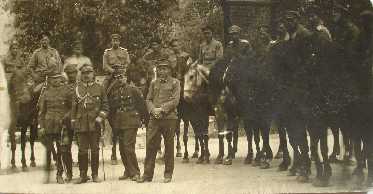 Беларуская (тарашкевіца): Станіслаў Булак-Балаховіч і польскія афіцэры. Берасьце, 1920.